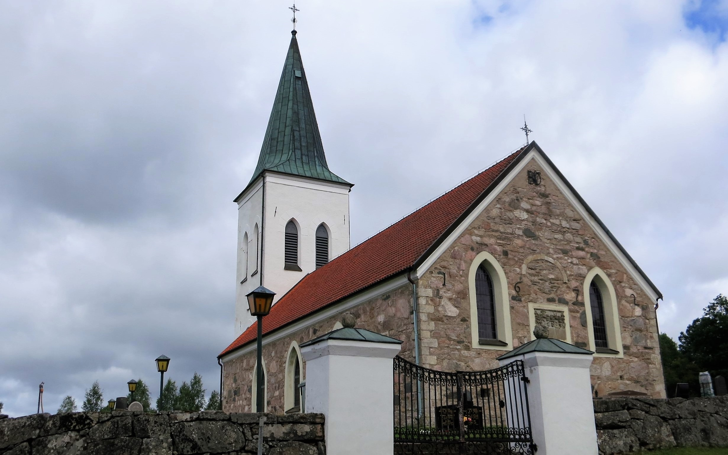 Källeryds kyrka, Växjö stift i Småland